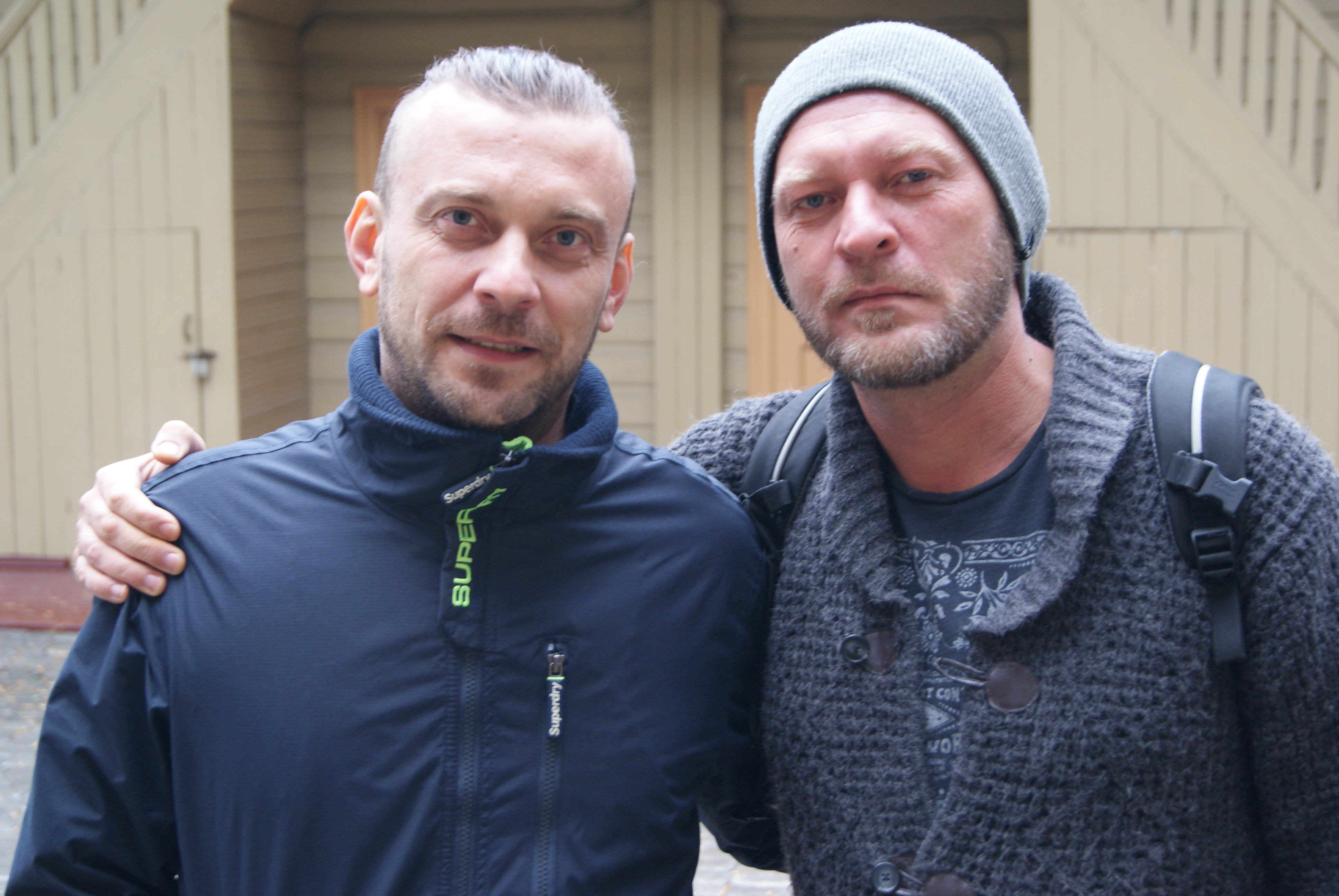 Братья Вячеслав (справа) и Михаил (слева) Дурненковы, российские драматурги